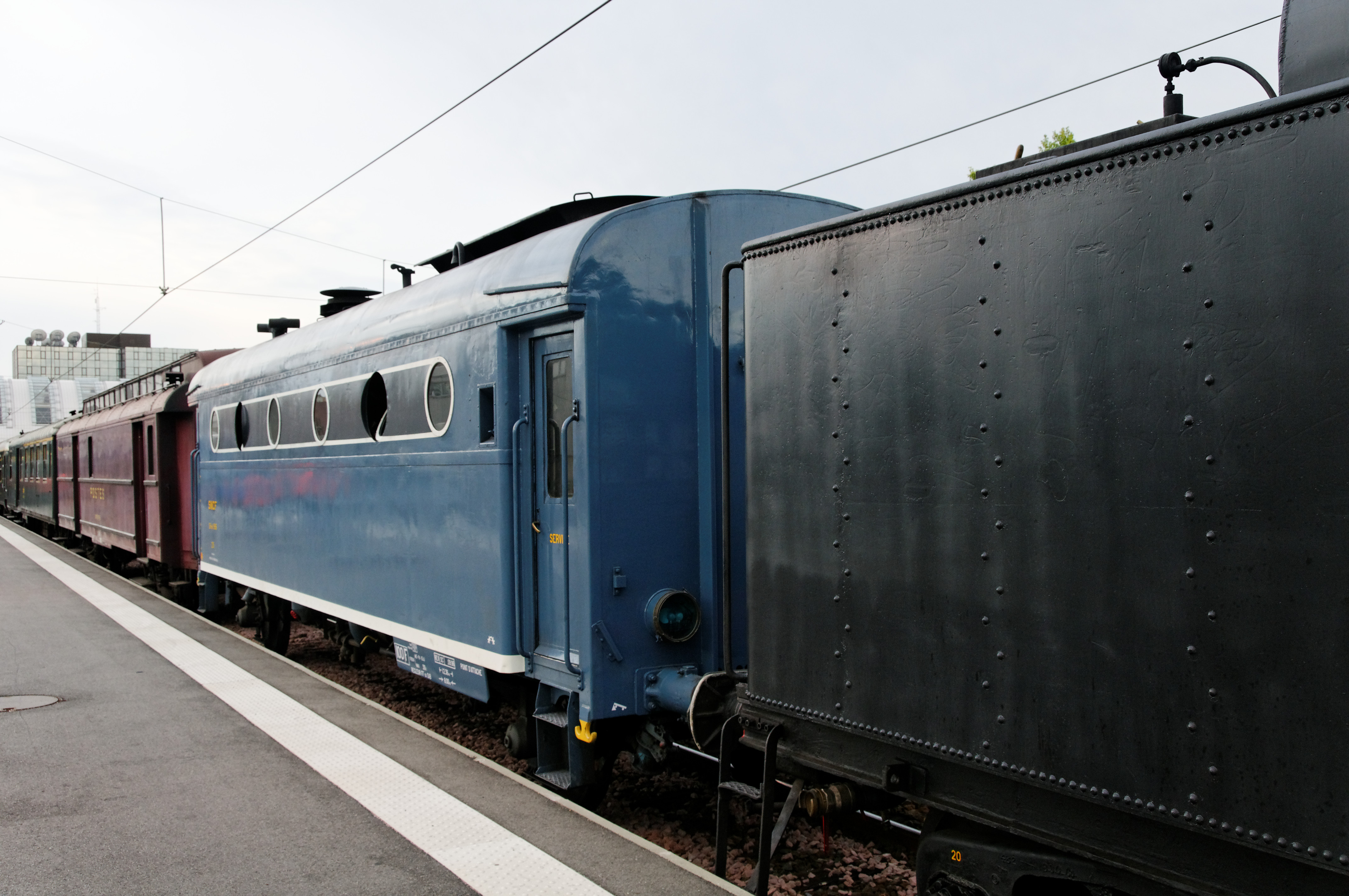 Train à vapeur « Ligérien Express » en direction de Saumur, au départ de la gare d'Orléans, Loiret, France Tender de la locomotive à vapeur 141 R 840 (1946) et voitures d'époque